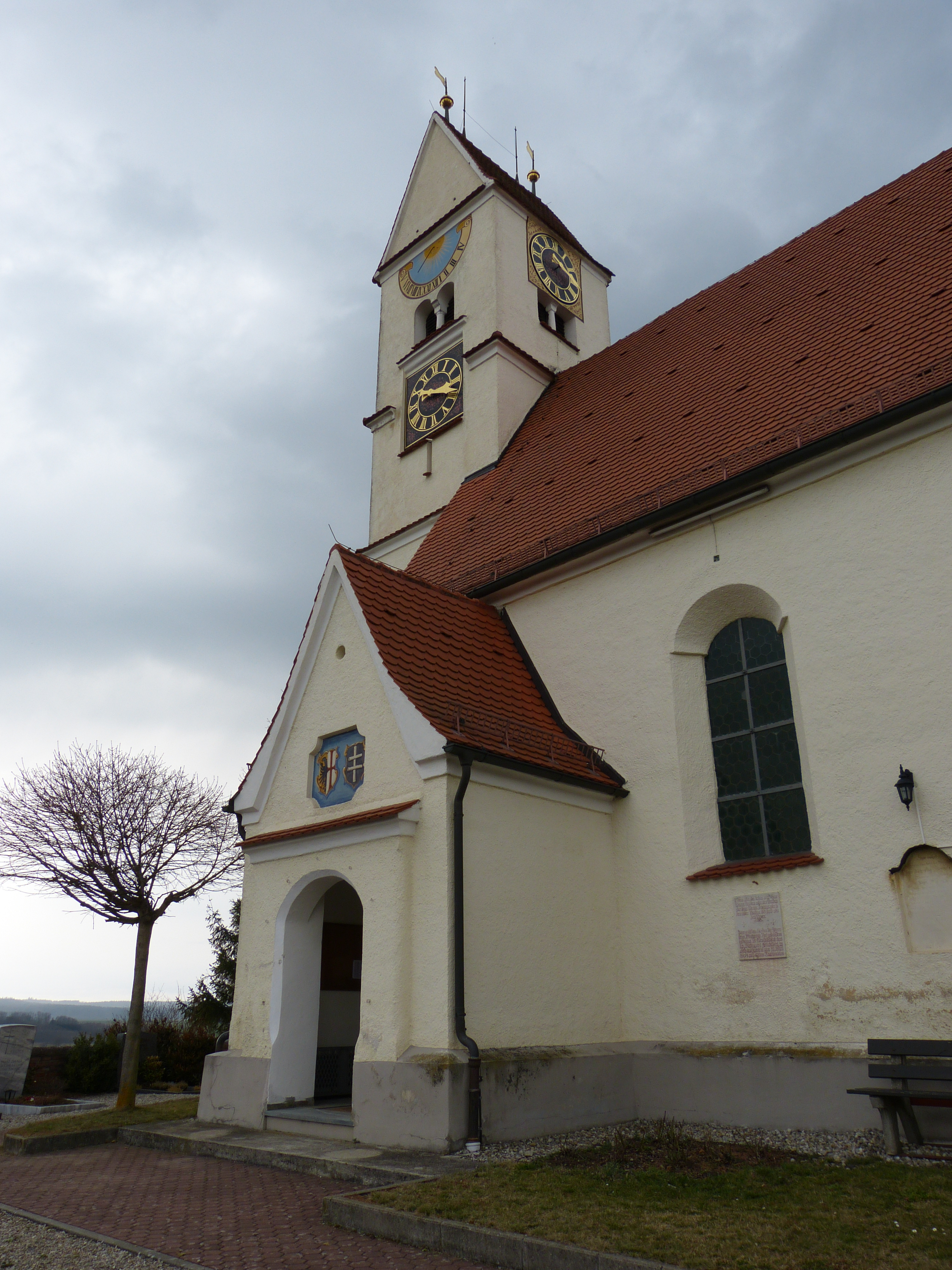 St. Vitus in Frickenhausen, Gemeinde Lauben, Landkreis Unterallgäu, Bayern